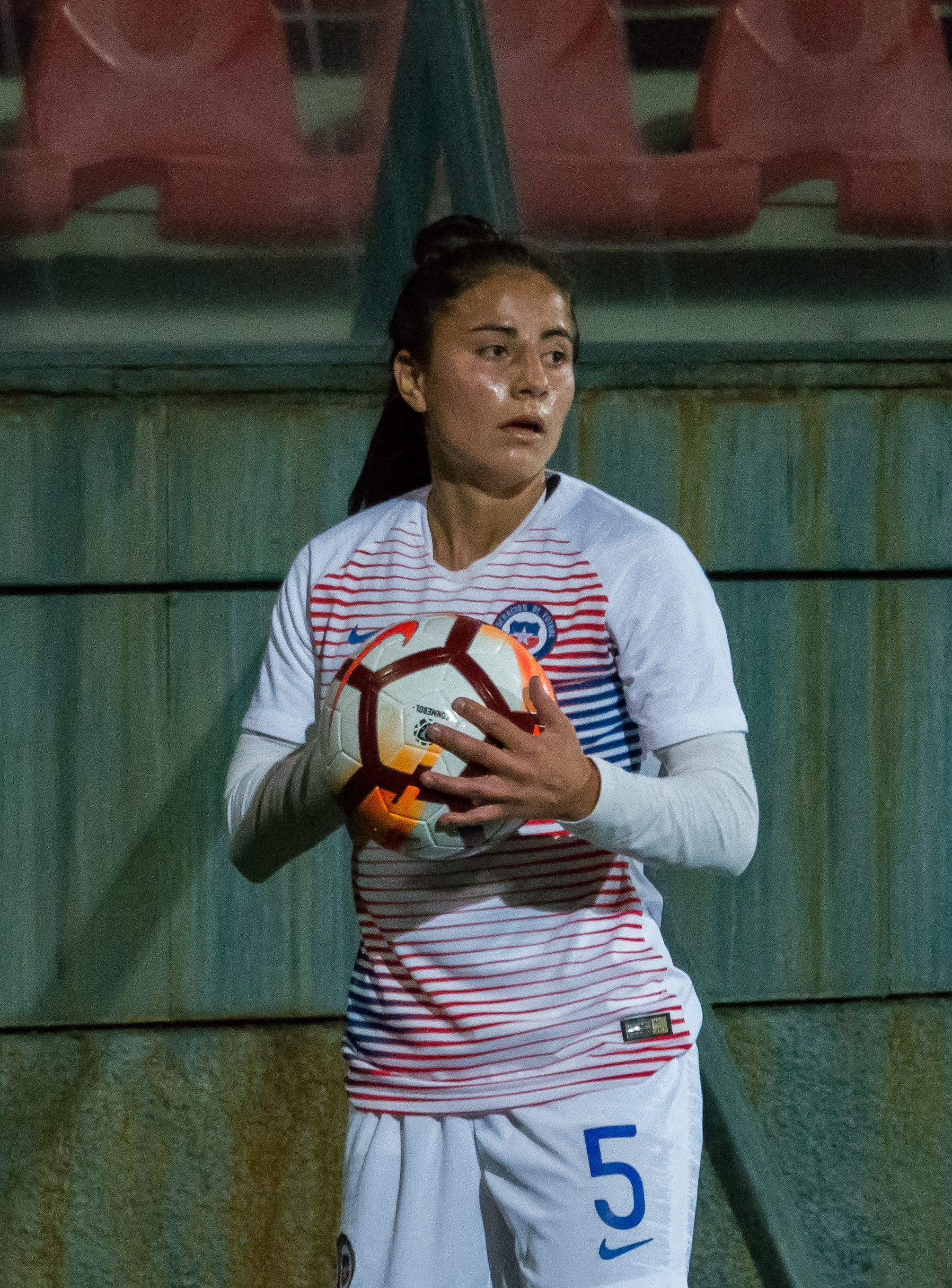 Ámbar Soruco, Chile v Sudáfrica, Estadio Santa Laura, Independencia, Santiago, Chile.